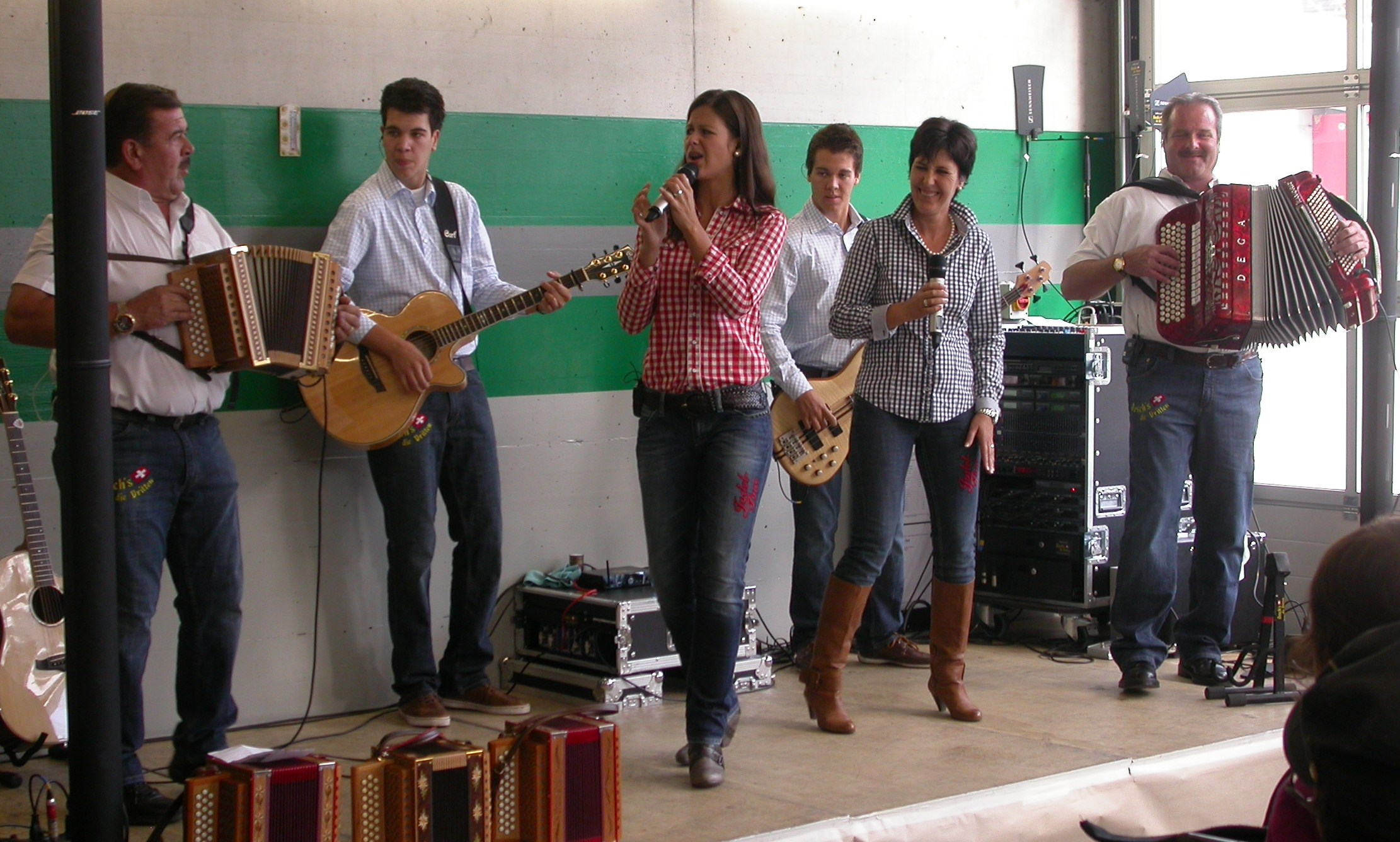 Oesch's die Dritten bei einem Auftritt (2011)